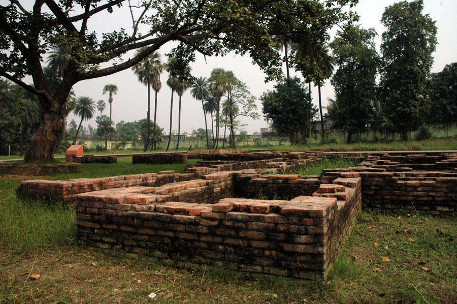 Ruins of Patliputra at Kumhrar, Patna, Bihar